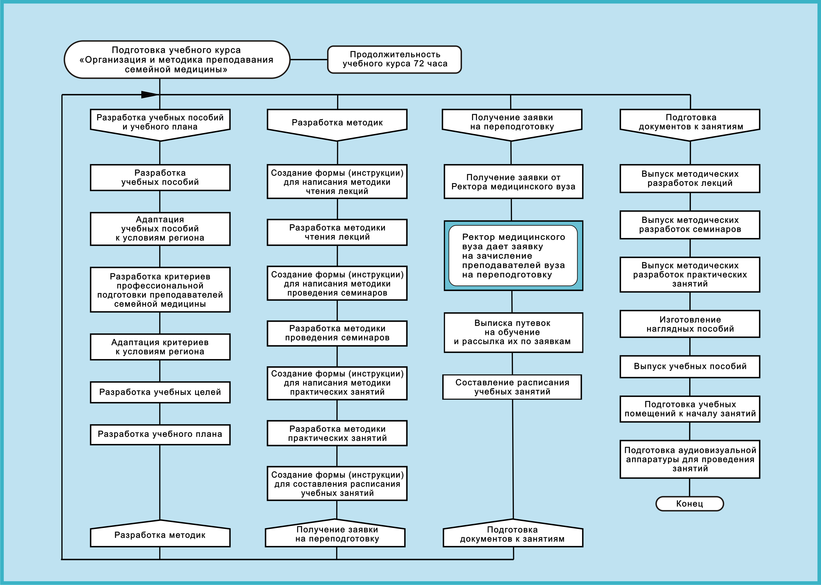 Послевузовское образование врачей общей практики — медицинский алгоритм на языке ДРАКОН. Алгоритм построен на основе описания, изложенного в книге: «Денисов И. Н., Иванов А. И. Преподаватель кафедры семейной медицины. Методическое пособие. — М.: ГОУ ВУНМЦ МЗ РФ, 2002. 198с. — ISBN 5-89004-164-9», в разделе План мероприятий по подготовке и проведению цикла тематического усовершенствования «Организация и методика преподавания семейной медицины» на стр. 96-97. Для преподавателей кафедр медицинских вузов и учебных заведений послевузовского профессионального образования врачей, участвующих в подготовке врачей общей практики (семейных врачей). Категория:Медицинская информатика Категория:Алгоритмы Категория:Представление знаний Category:Health informatics Category:Algorithms Category:Knowledge representation